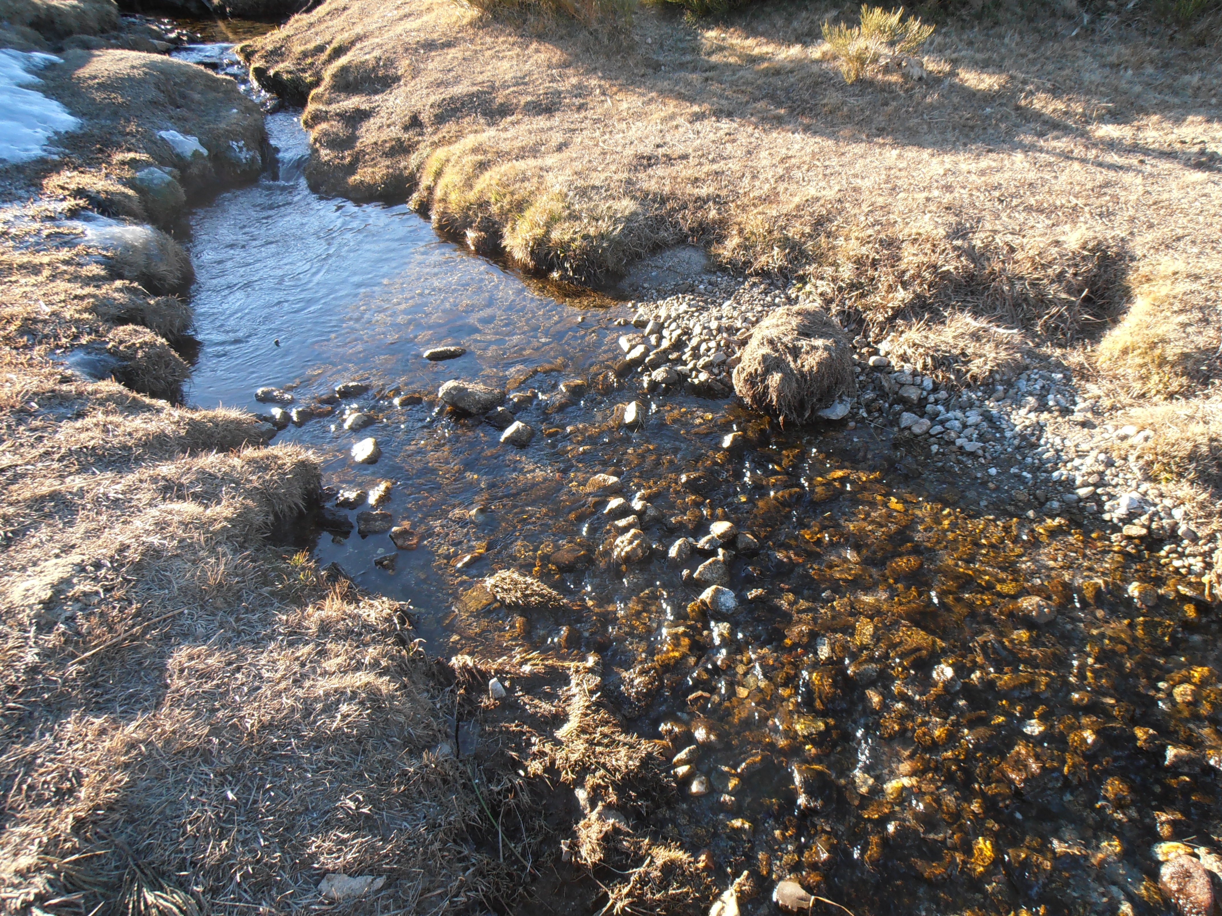 Río Riofrío a su paso por La Covatilla